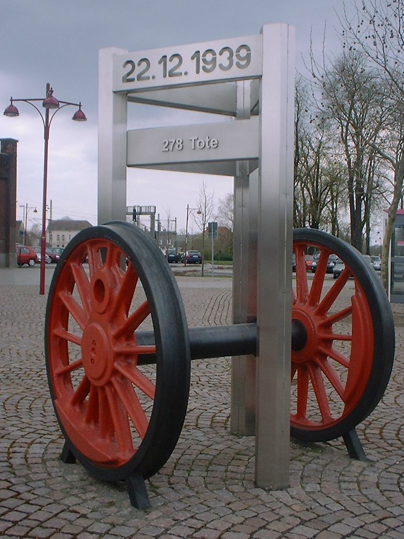 Denkmal (vor dem Bahnhof) für das Eisenbahnunglück am 22.12.1939 in Genthin in Sachsen-Anhalt, Deutschland